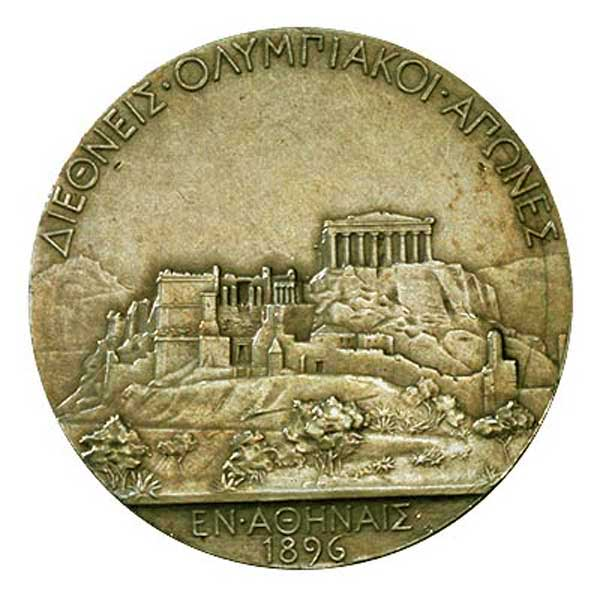 Серебряная медаль Игр I Олимпиады, оборот